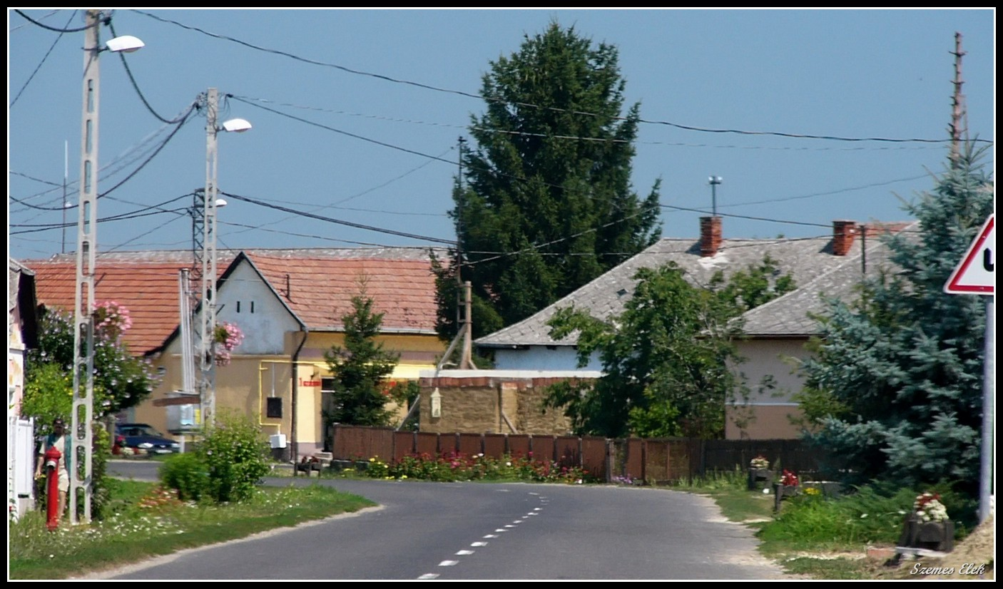 Kömörő, Hungary